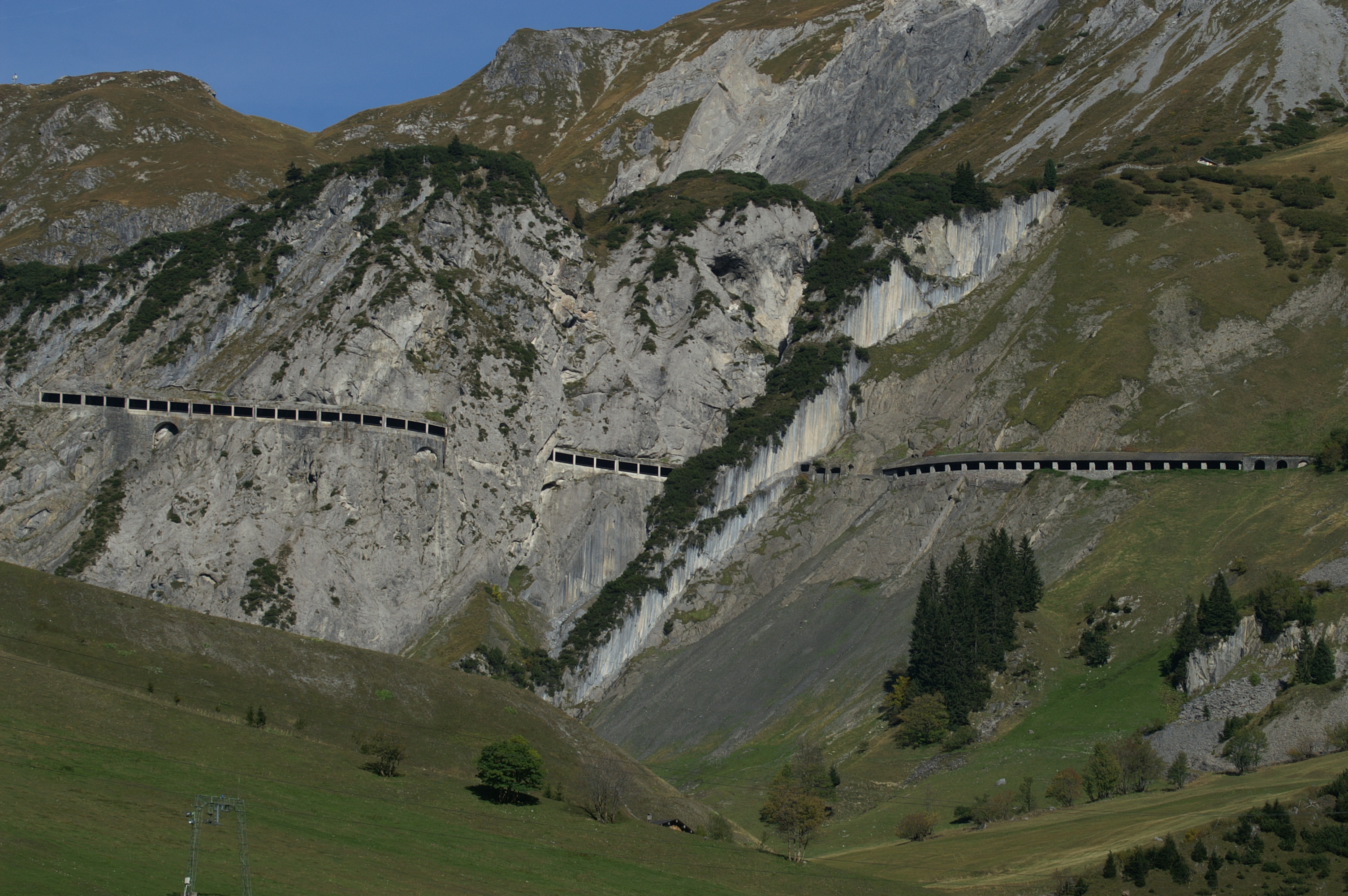 Flexenpass-Strasse Galerien